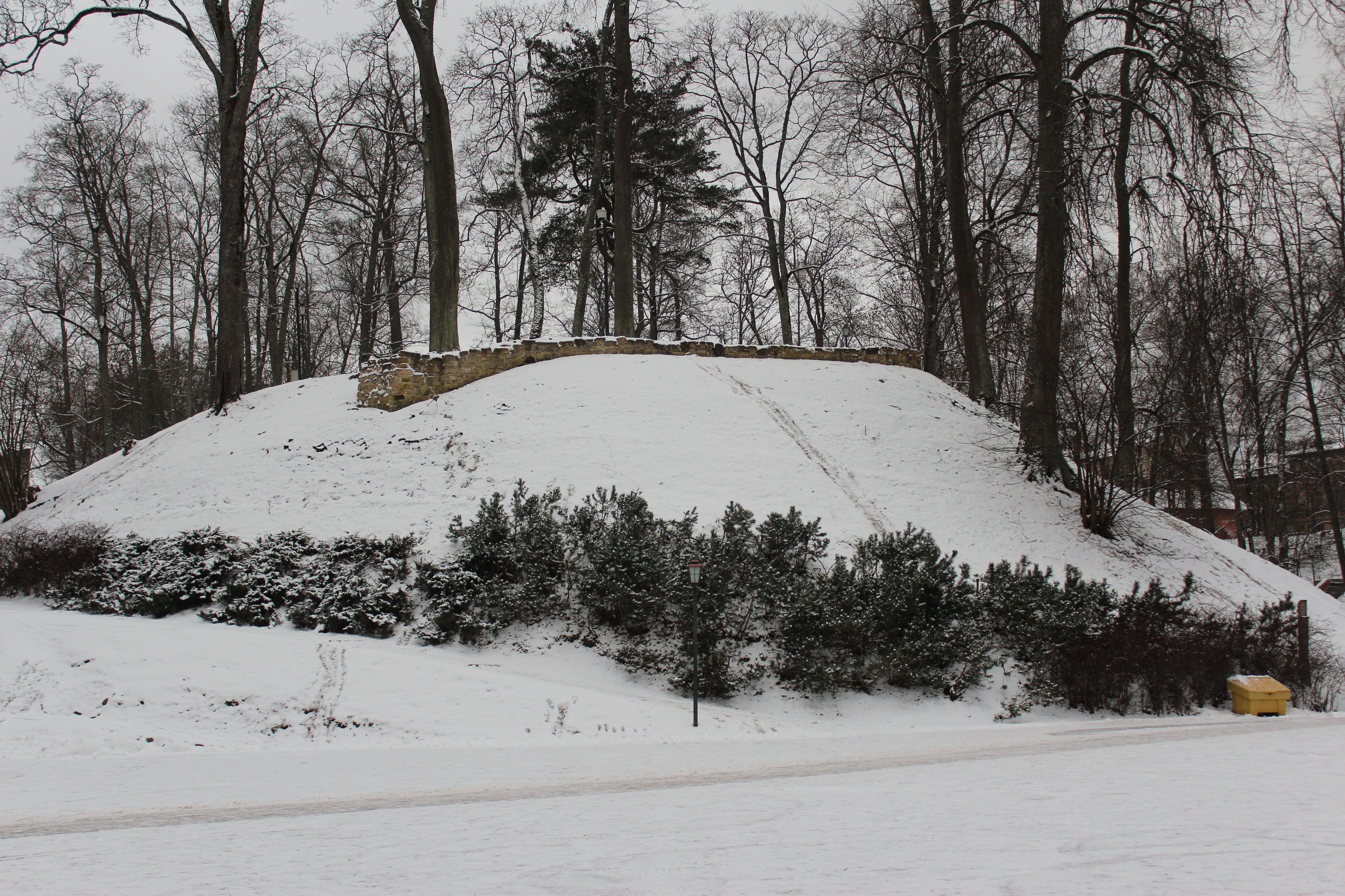 Riekstu kalns - pilskalns Cēsīs. Skats no ziemeļu gala.